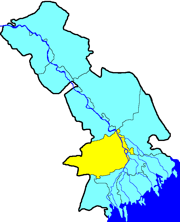 Наримановский район на карте Астарханской области